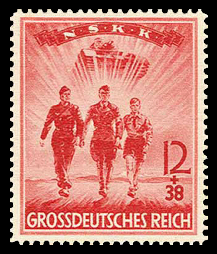 Stamp description / Briefmarkenbeschreibung